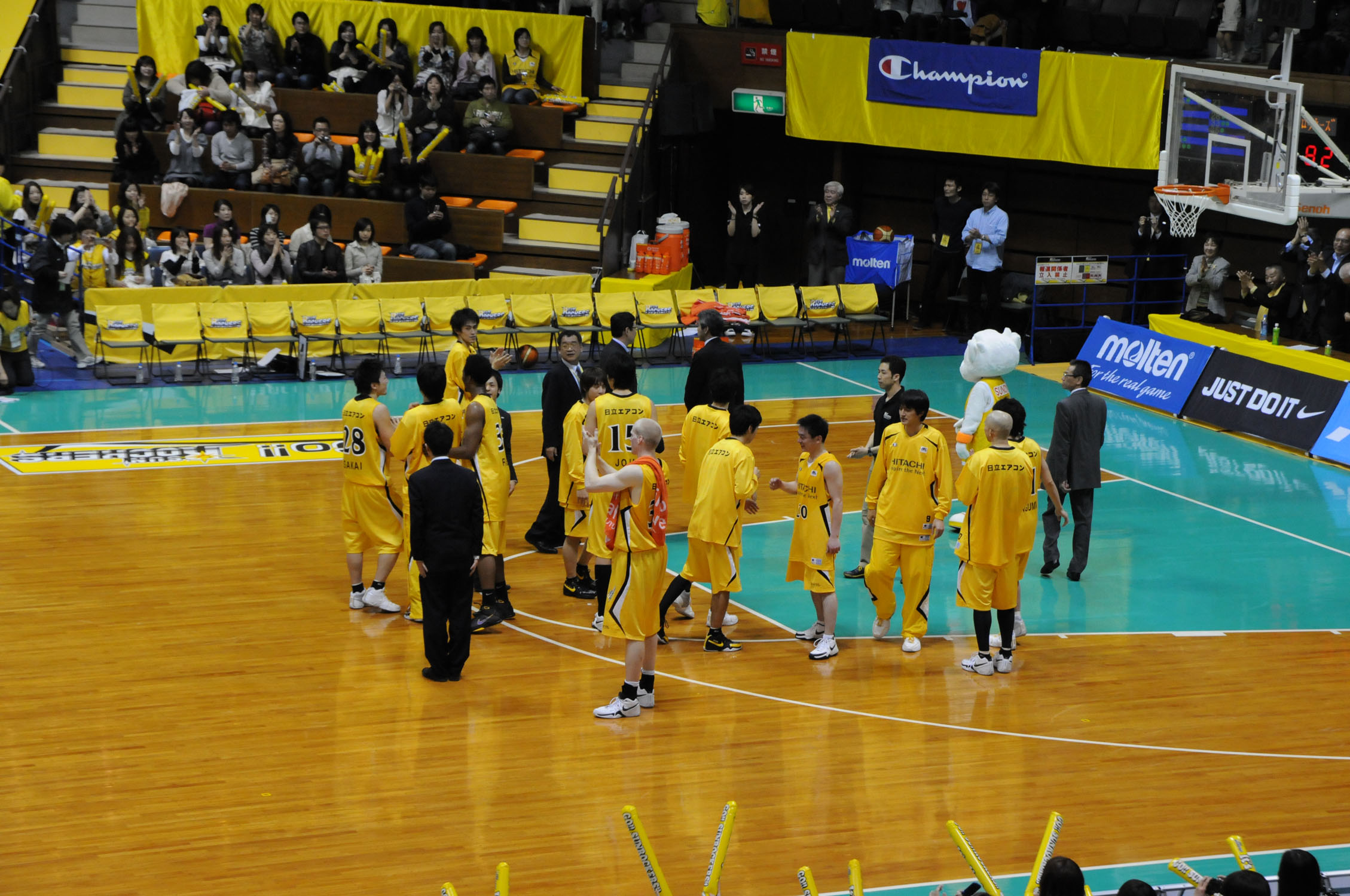 日立サンロッカーズ、代々木第二体育館で。